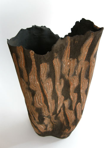 Lidia Boševski: "Bush", 2008 godine, terraccota-brown semire, height 38 cm